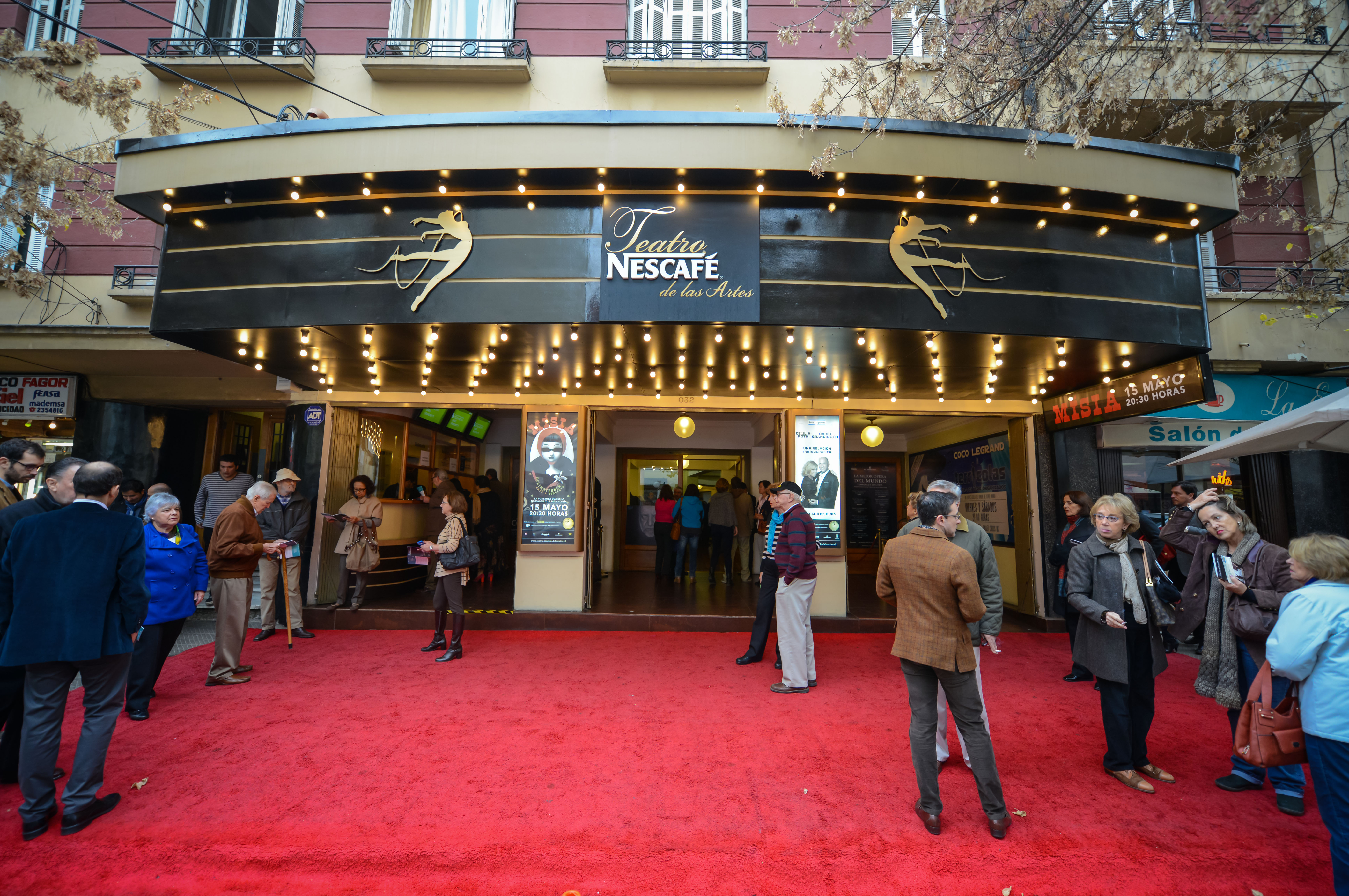 Frente del Teatro NESCAFÉ de las Artes en Santiago de Chile.